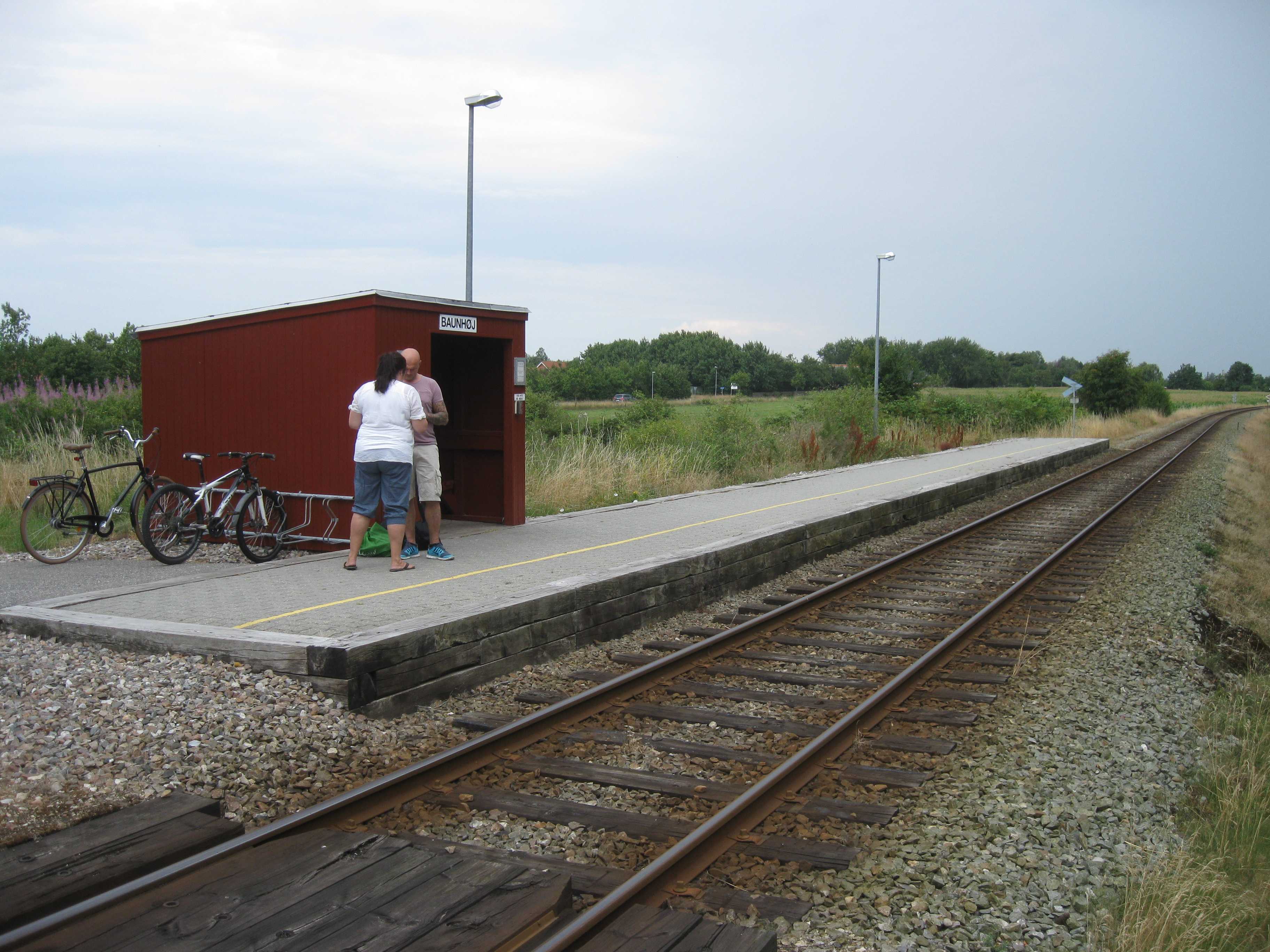 Baunhøj station, Vestbanen